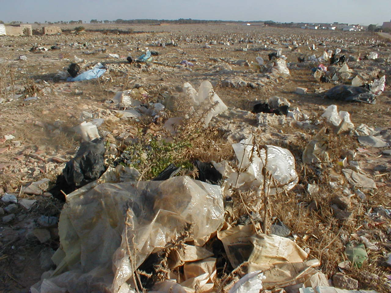 Walon: Saetchots d' plastike evolés dins les tchamps